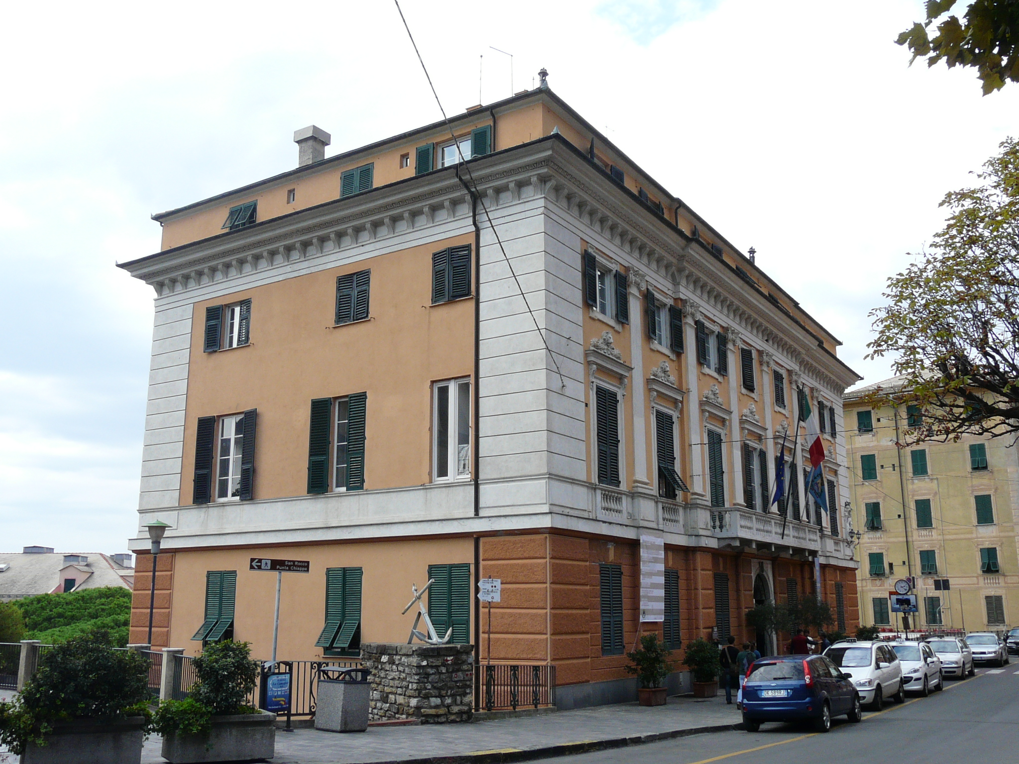 Municipio di Camogli, Liguria, Italia